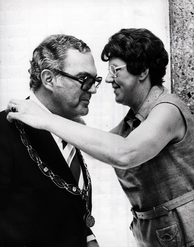 Drs. A.J. Lems (P.v.d.A) wordt geïnstalleerd als burgemeester van Schiedam. Loco-burgemeester Verheij hangt hem de ambtsketting om. Schiedam, Nederland, 1 augustus 1974.